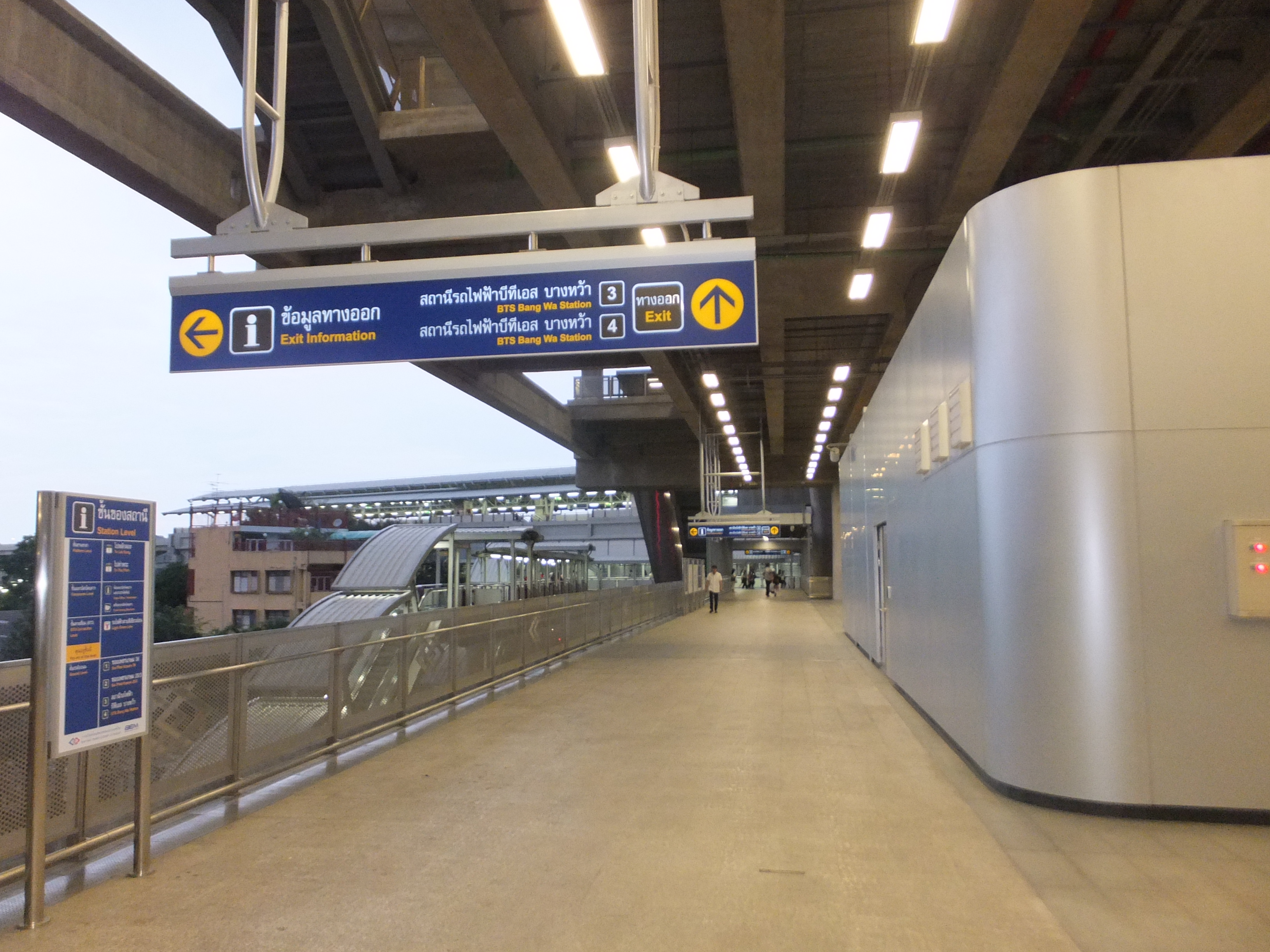 バンコク・メトロ バーンワー駅 2階連絡コンコース（奥に見えるのがバンコク・スカイトレインのホーム）